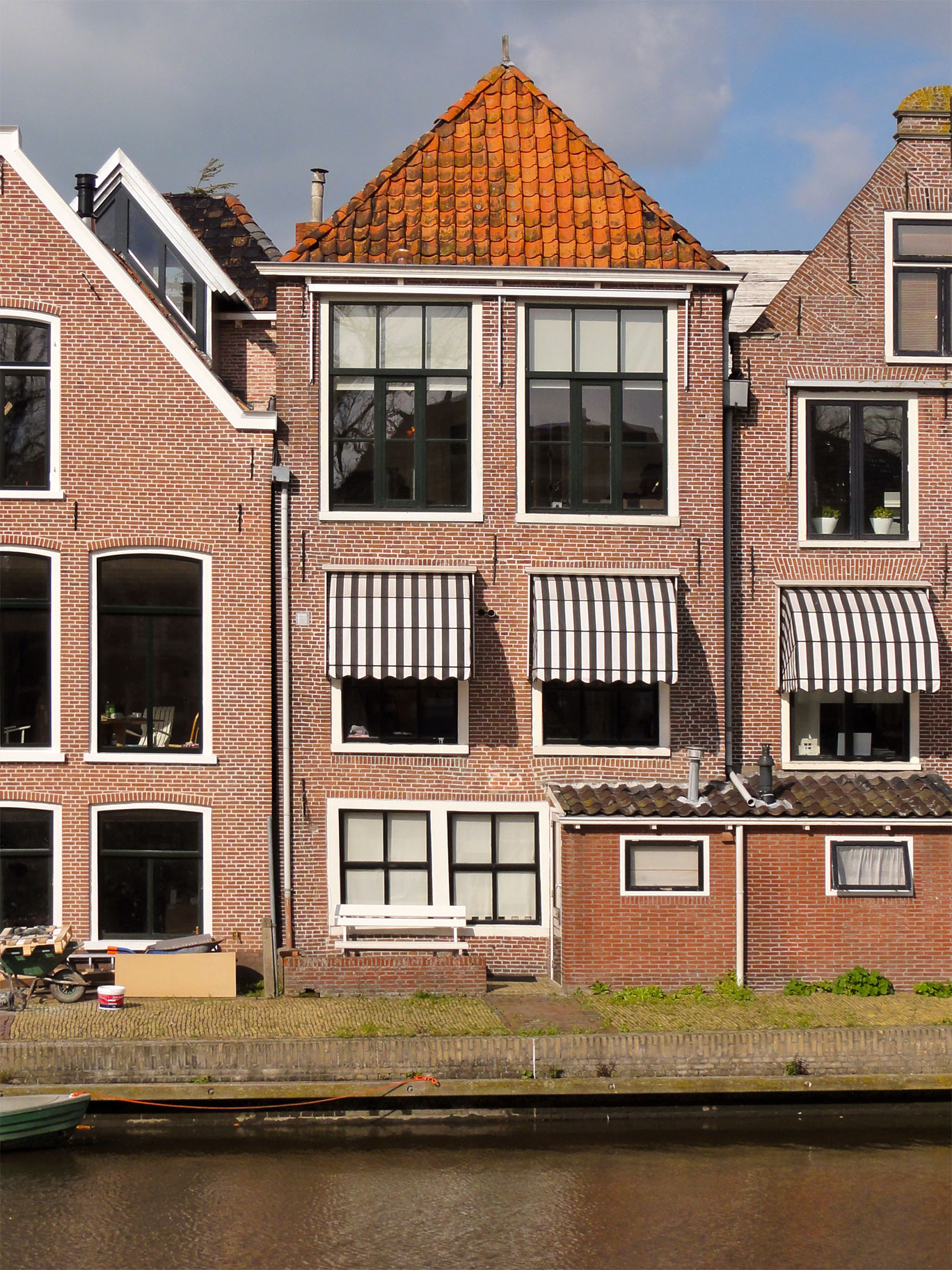 Achtergevel Nauwstraat 7 Dokkum, rijksmonument